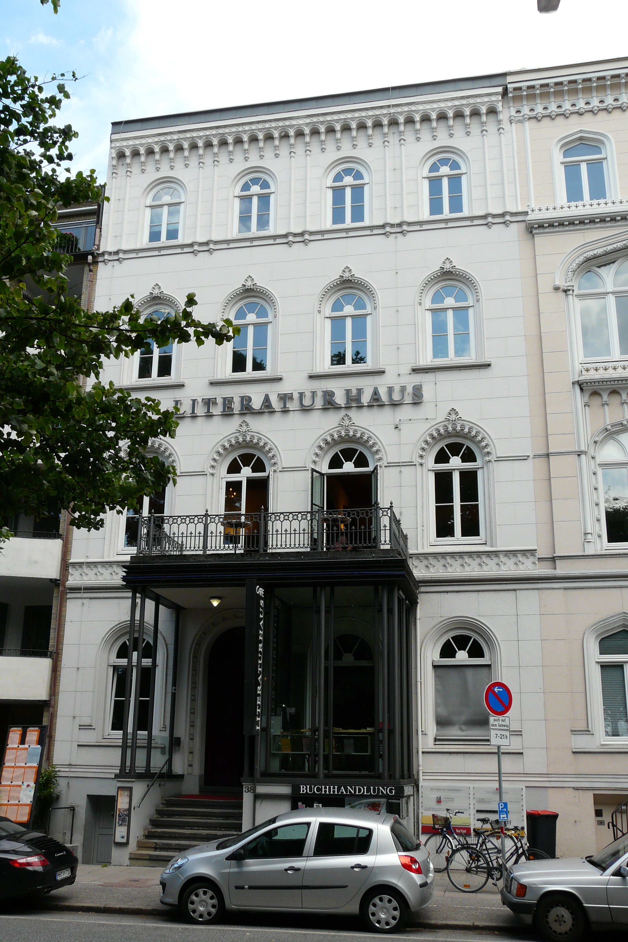 Das Literaturhaus in Hamburg(Außenansicht)